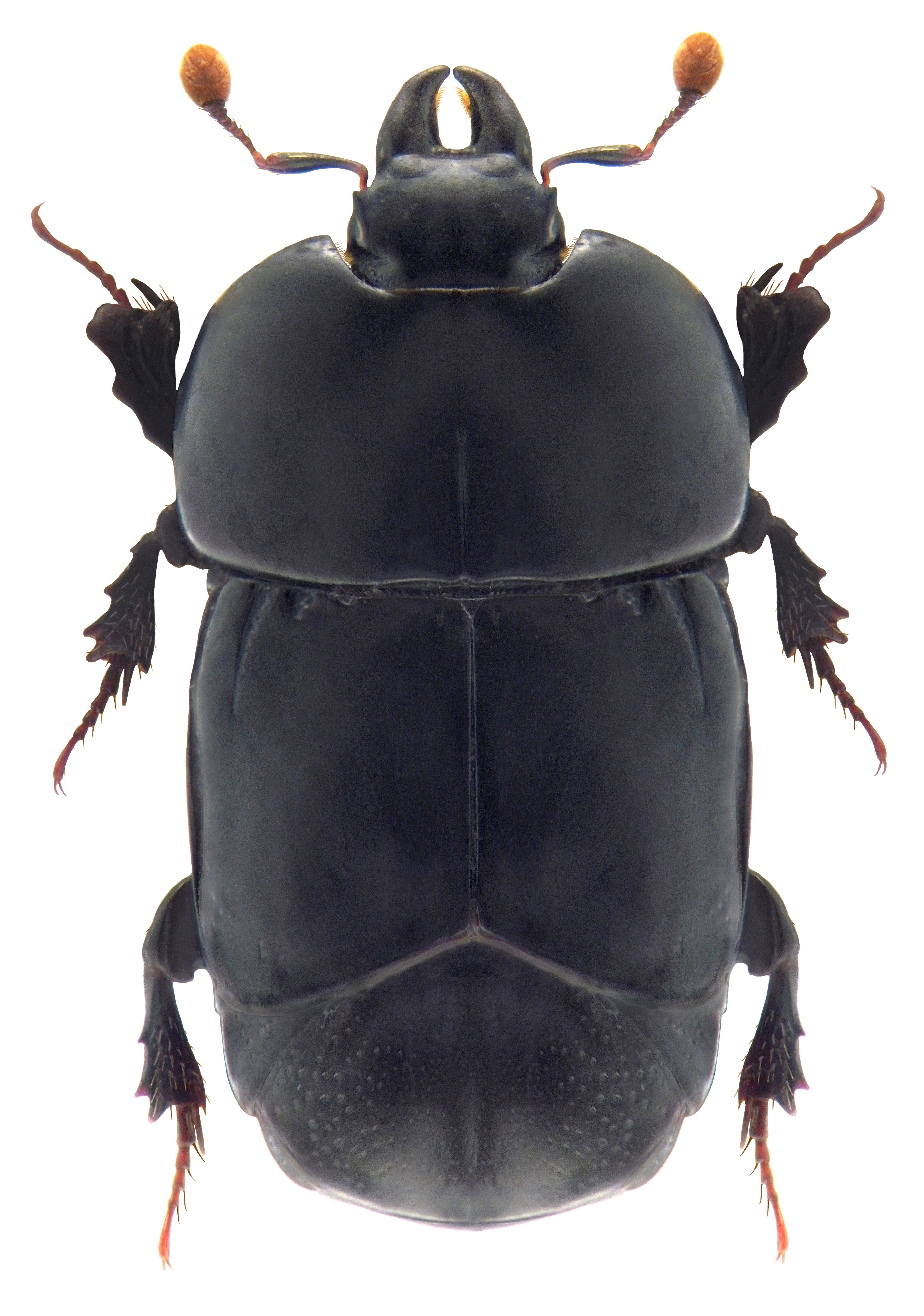 Familie: Histeridae Groesse: 8-9 mm Verbreitung: Europa Ökologie: unter Laubholzrinde, vor allem bei Pappeln Fundort: Germania, Thüringen, Gera, Pohlitz leg. det. A.Weigel, 1996 Photo: U.Schmidt, 2010